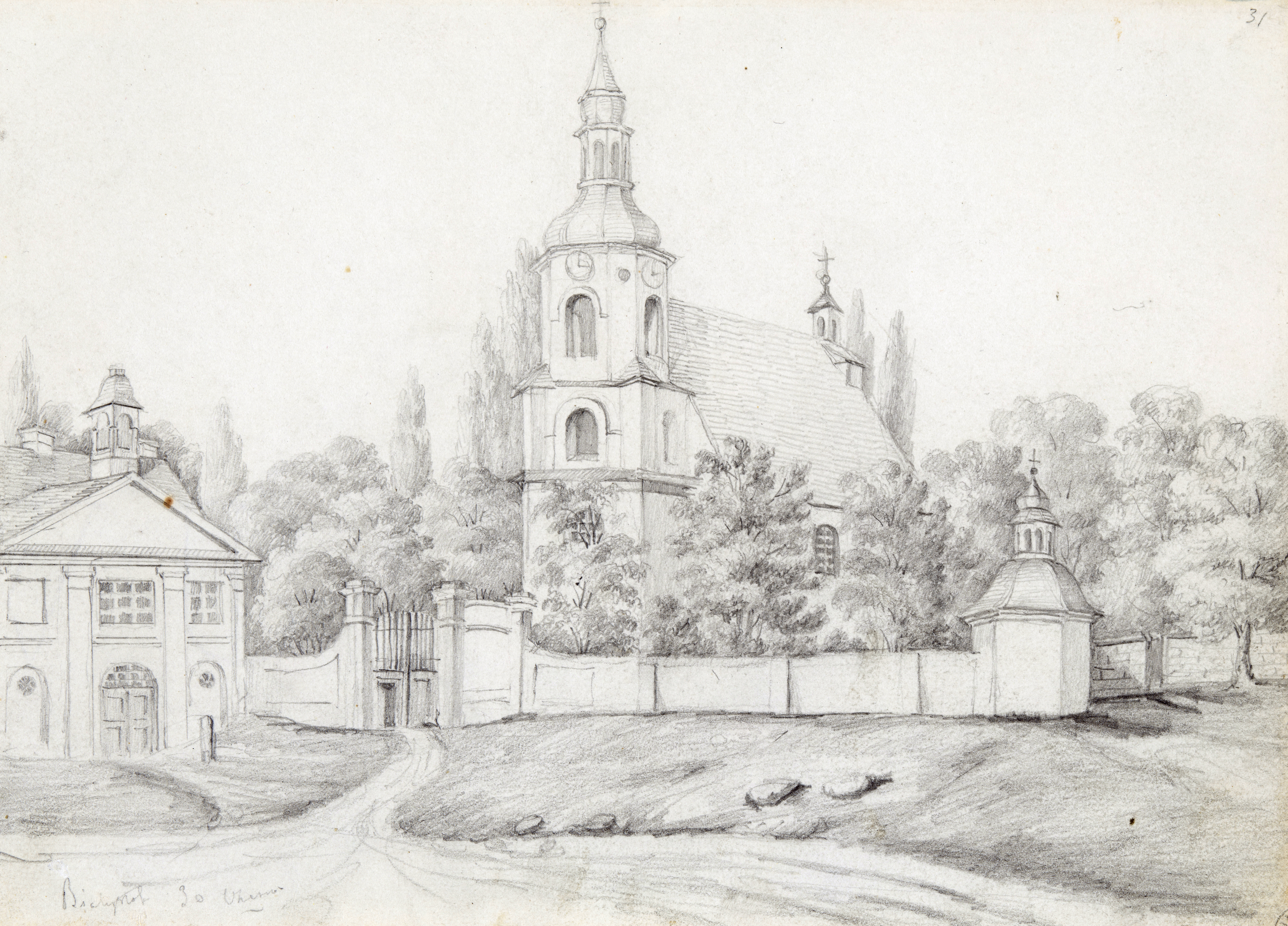 Беларуская (тарашкевіца): Беласток (Biełastok), Фарны касьцёл (Fara)